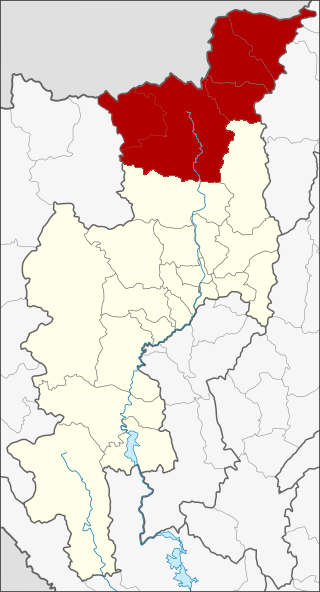 อาณาเขตของจังหวัดไชยปราการ: อำเภอฝาง อำเภอแม่อาย อำเภอไชยปราการ อำเภอเชียงดาว และอำเภอเวียงแหง